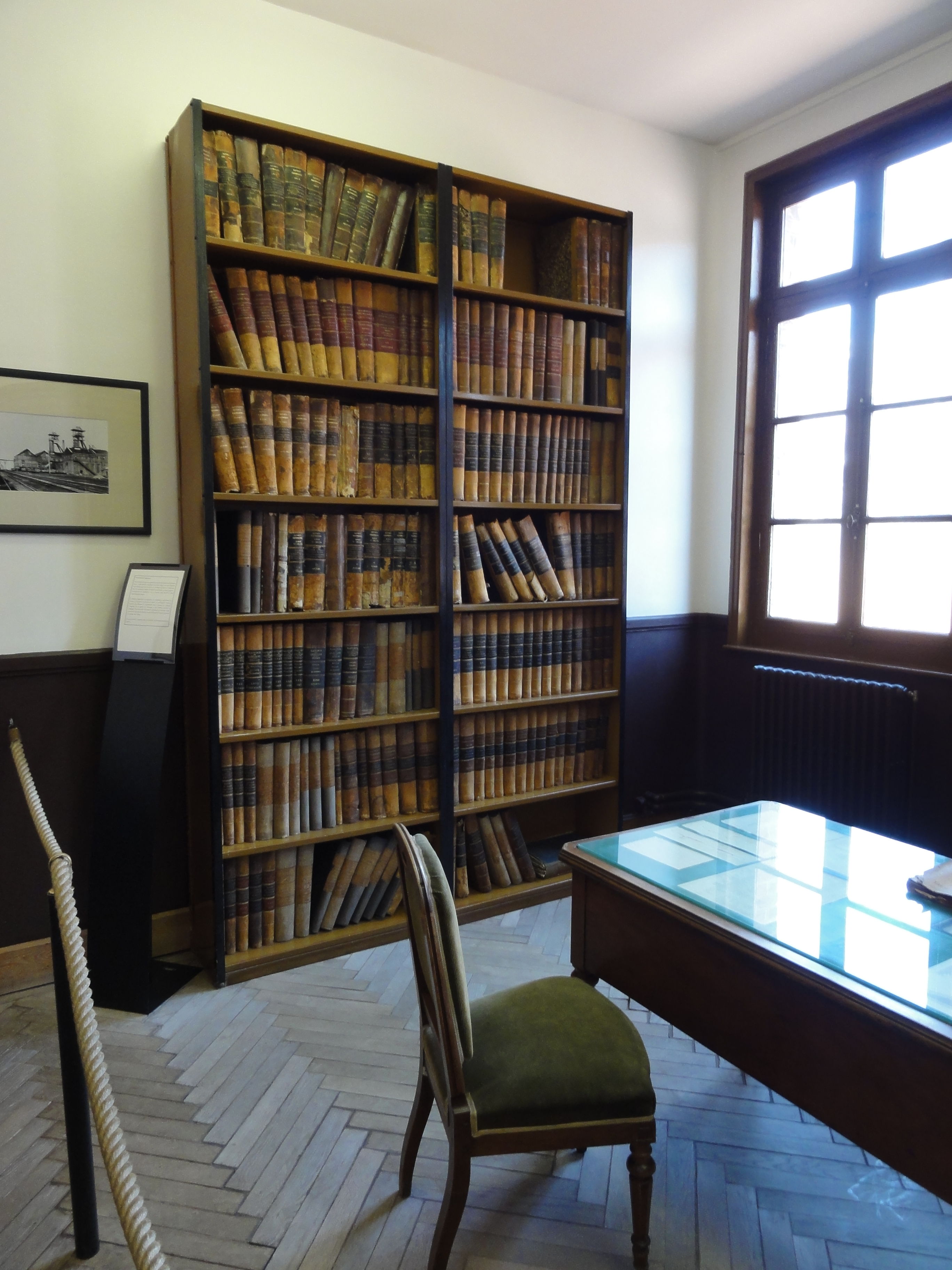 La fosse Delloye de la Compagnie des mines d'Aniche, actuel Centre historique minier de Lewarde, était un charbonnage du bassin minier du Nord-Pas-de-Calais constitué de deux puits situé à Lewarde, Nord, Nord-Pas-de-Calais, France. Elle est classée aux monuments historiques le 21 septembre 2010 et inscrite sur la liste du patrimoine mondial par l'Unesco le 30 juin 2012 et y constitue le site no 23.